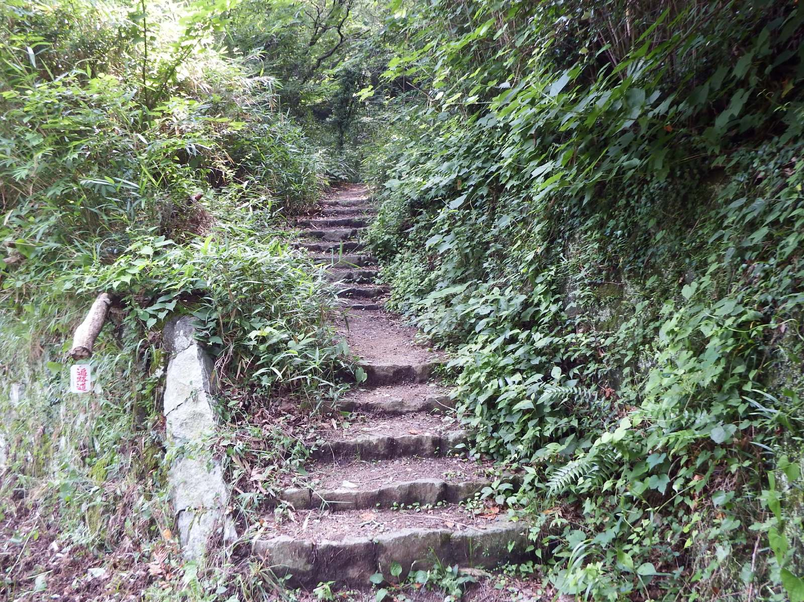 讃岐遍路道 根香寺道